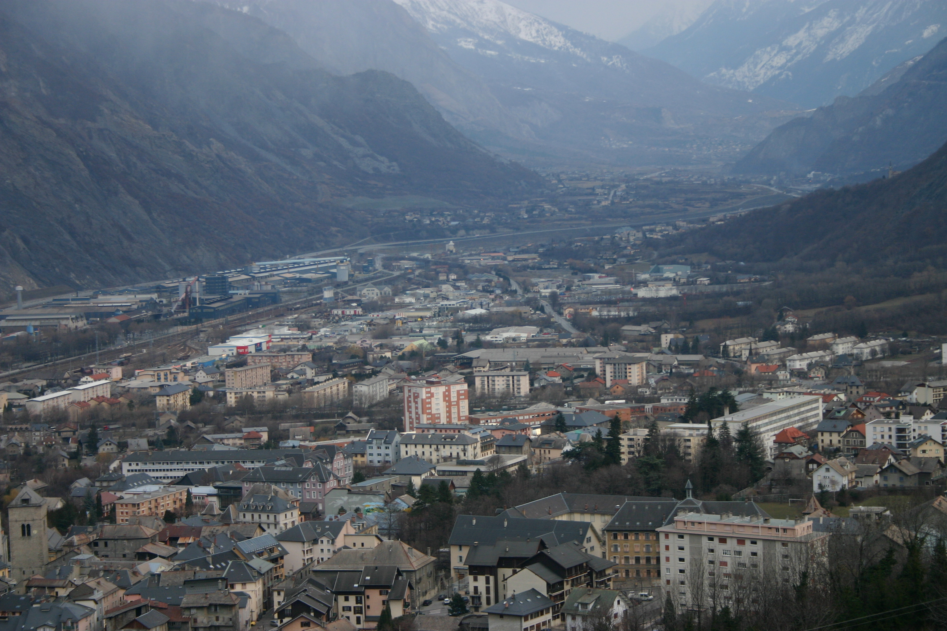 Vue sur Saint Jean de Maurienne Auteur : Modesto Alexandre